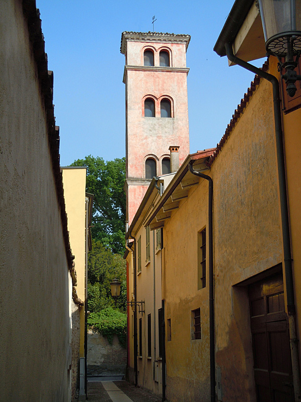 Castel Goffredo, vcolo Carlo V in Castelvecchio.